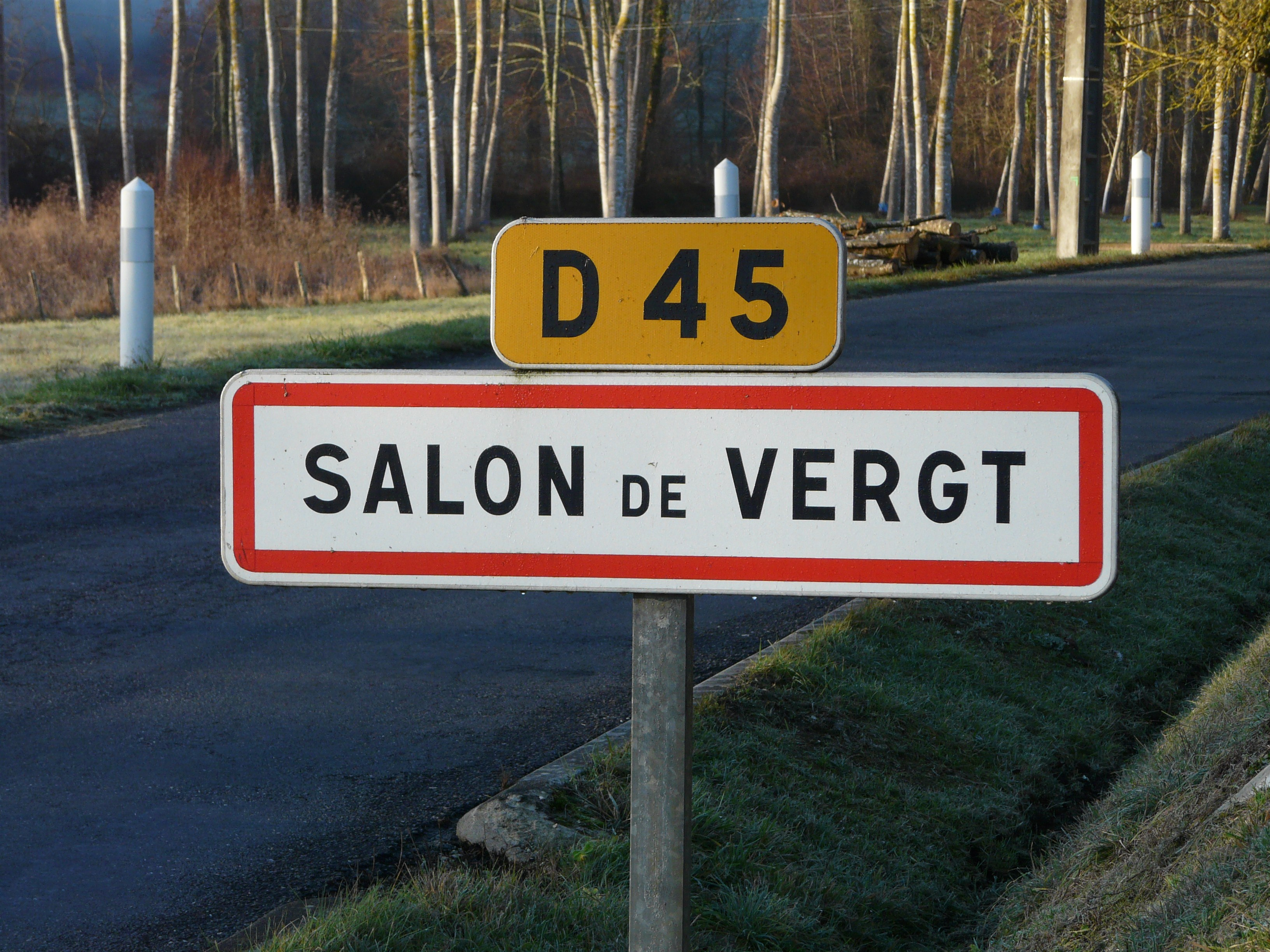 Panneau d'entrée dans le village de Salon, Dordogne, France.